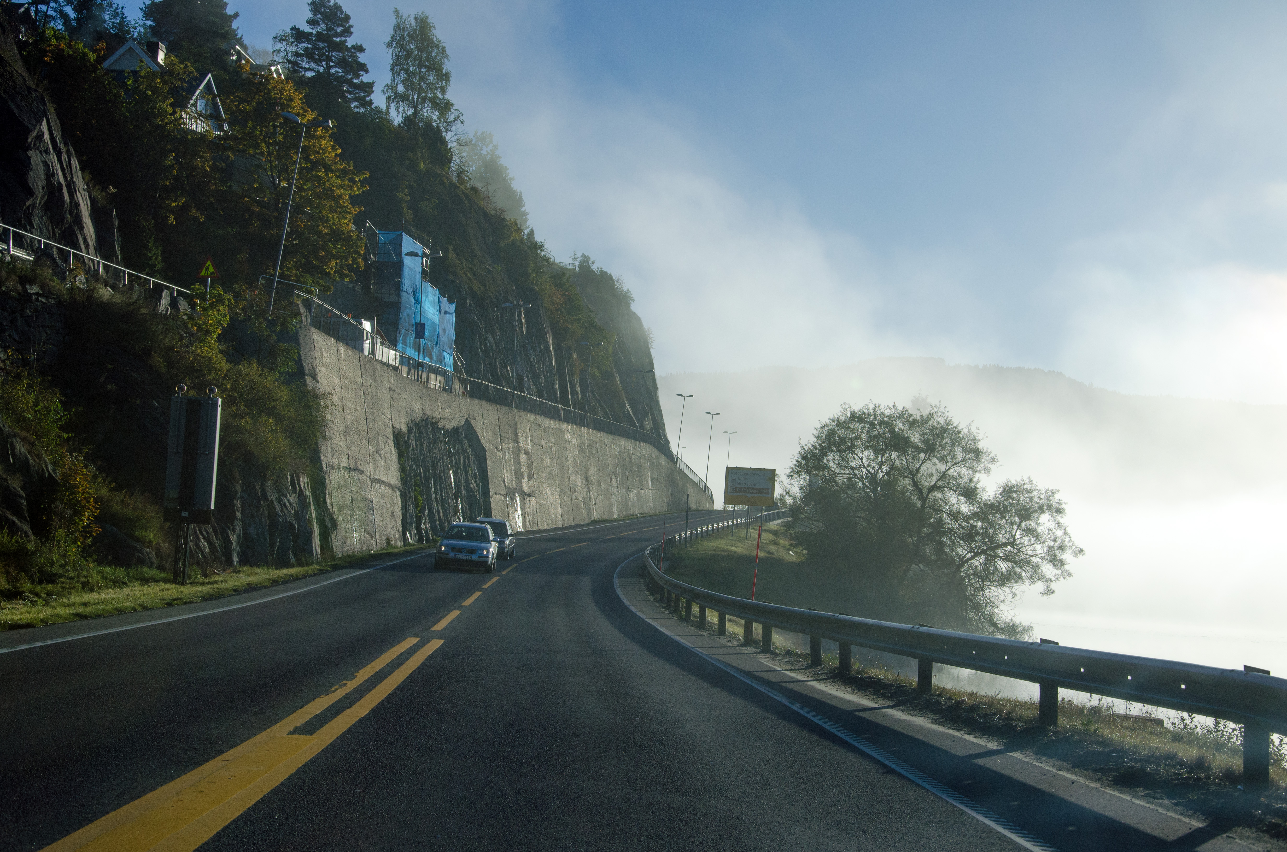 E134 Heddalsvegen i Notodden